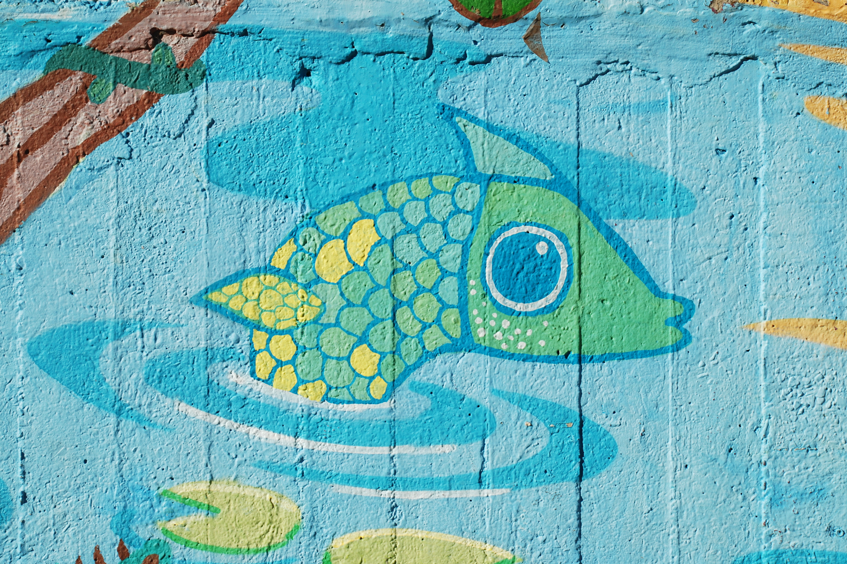 Belgique - Louvain-la-Neuve - Place des Wallons - peintures murales This photo of immovable heritage has been taken in the Walloon Region